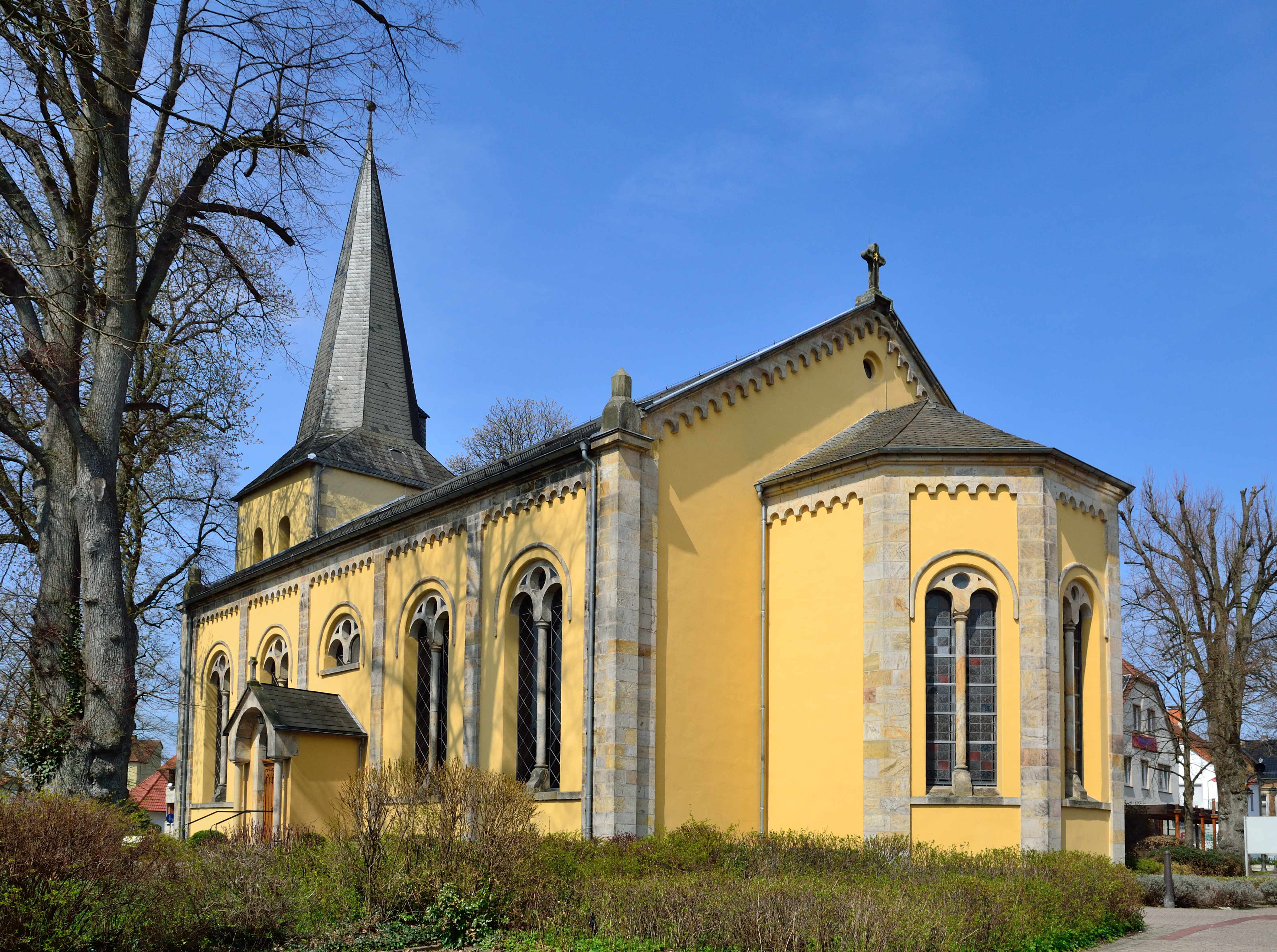 This is a photograph of an architectural monument. Evangelische Kirche Schlangen